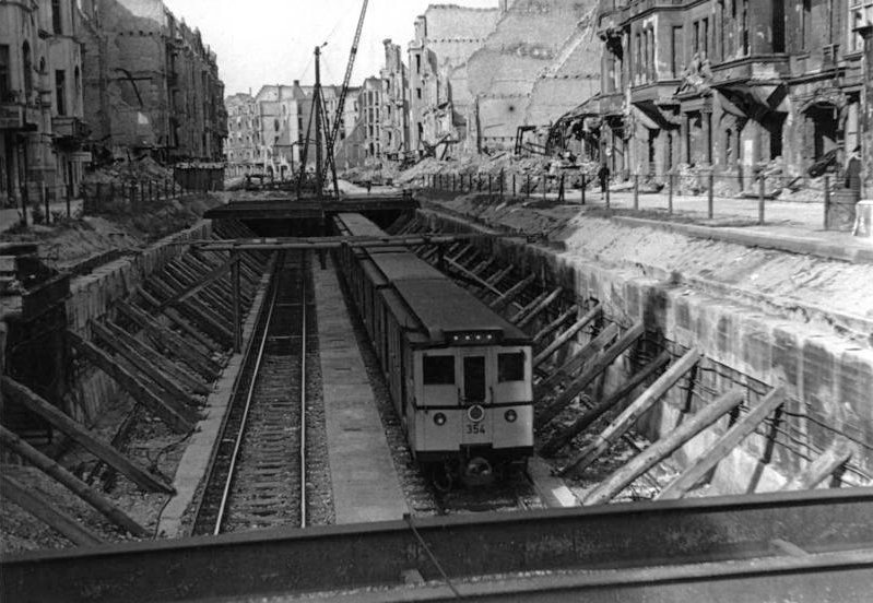 Berlin, U-Bahn in offfenem U-Bahnschacht Zentralbild-Vitanova Berlin 1946. Die Strecke liegt zwar an vielen Stellen noch frei, aber die U-Bahn nach Krumme Lanke fährt! Hier ein kurzes Stück nach dem Bahnhof Nürnberger Platz. 5222-50